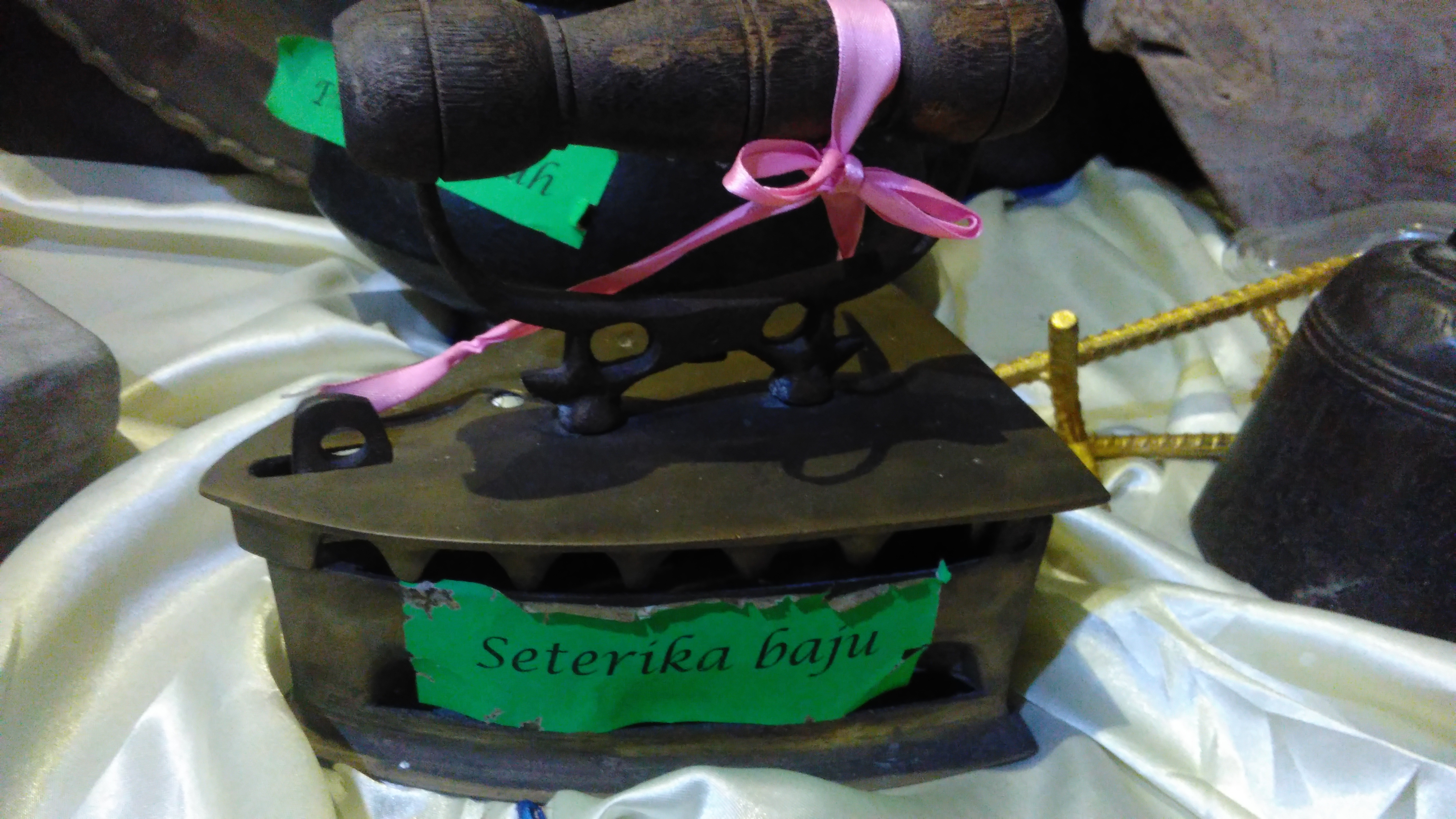 Seterika Besi @ Arang